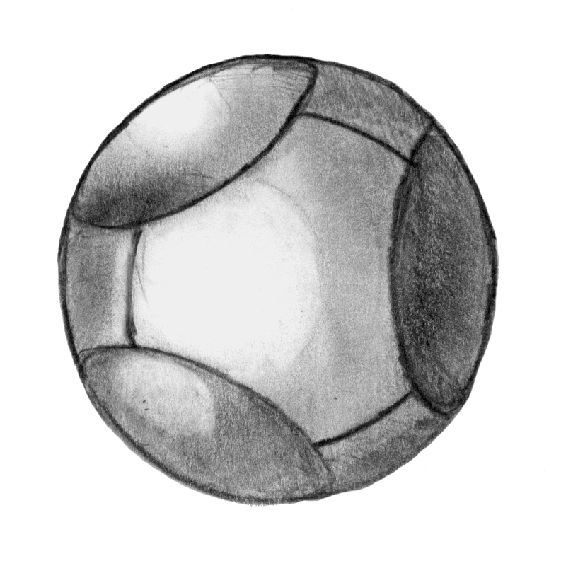 balle utilisée pour jouer au quidditch